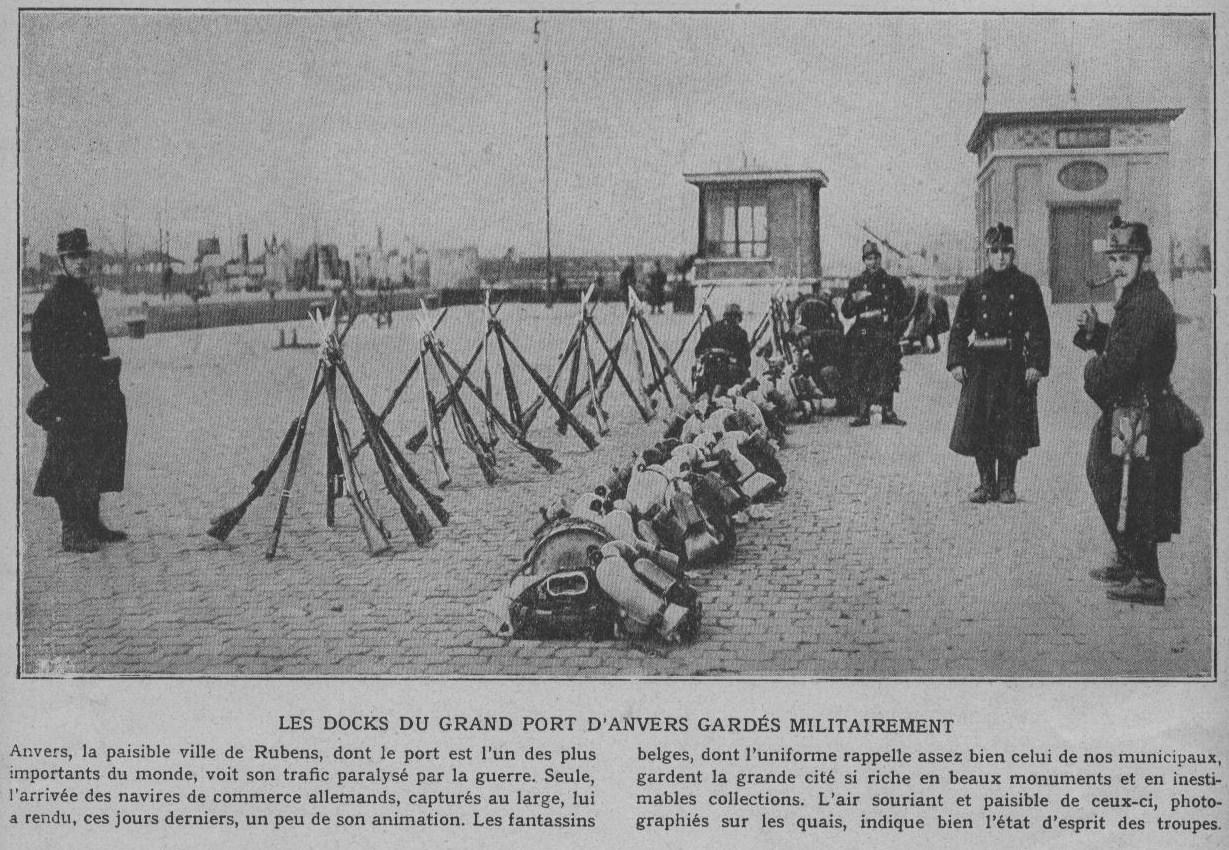 «La Belgique envahie à gardé son sang-froid». Les forces belges à Anvers.